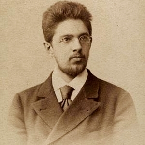 Vladimir Anatol'evič Ždanov (1869-1932), uno degli avvocati che assistè il rivoluzionario Ivan Kaljaev al suo processo in data 18 aprile 1905